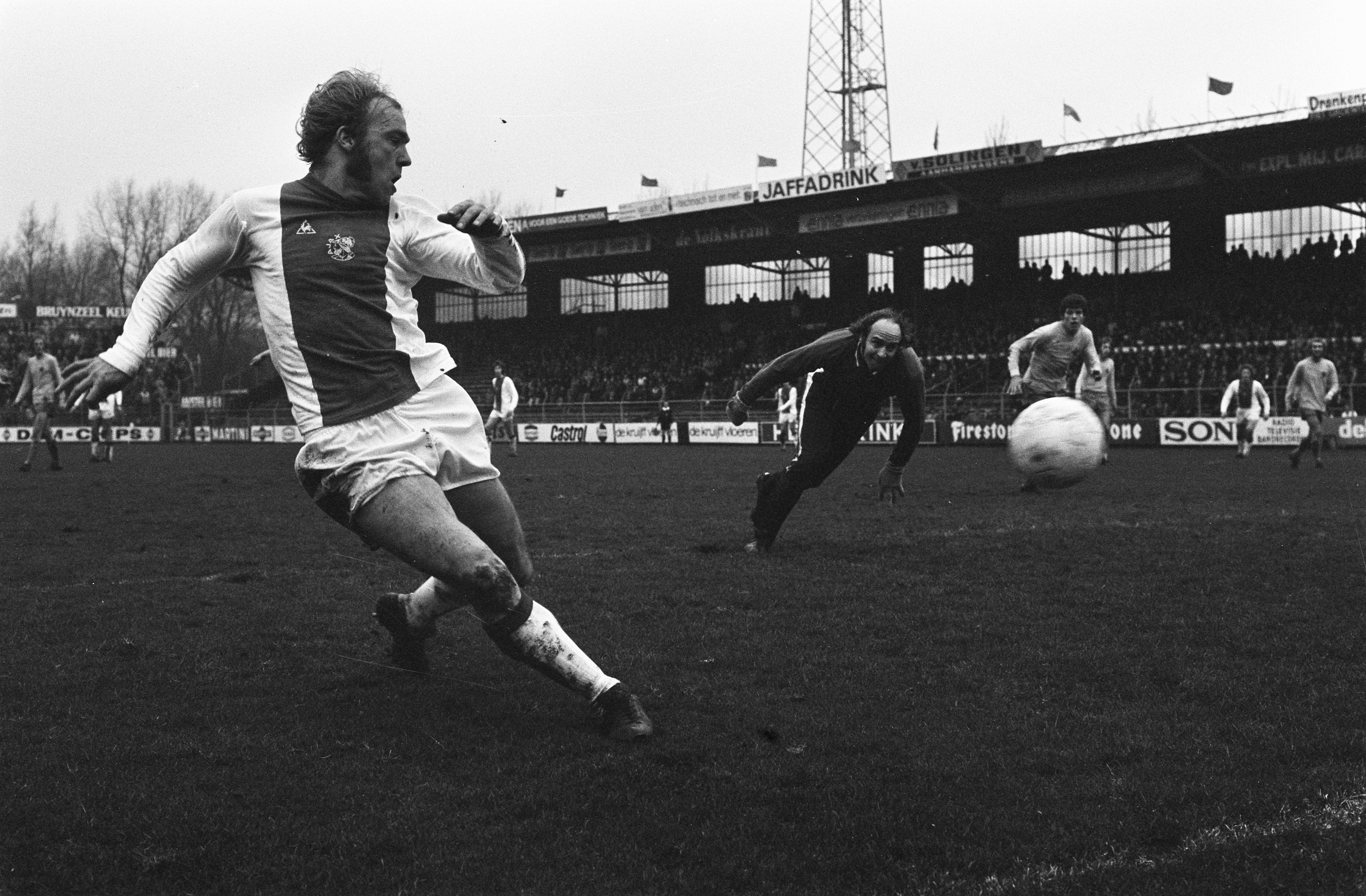 Collectie / Archief : Fotocollectie Anefo Reportage / Serie : [ onbekend ] Beschrijving : Ajax tegen MVV 4-2, Brokamp scoort 3-2, rechts keeper Mathijssen Datum : 5 januari 1975 Trefwoorden : sport, voetbal Persoonsnaam : Brokamp Instellingsnaam : AJAX Fotograaf : Mieremet, Rob / Anefo Auteursrechthebbende : Nationaal Archief Materiaalsoort : Negatief (zwart/wit) Nummer archiefinventaris : bekijk toegang 2.24.01.05 Bestanddeelnummer : 927-6749